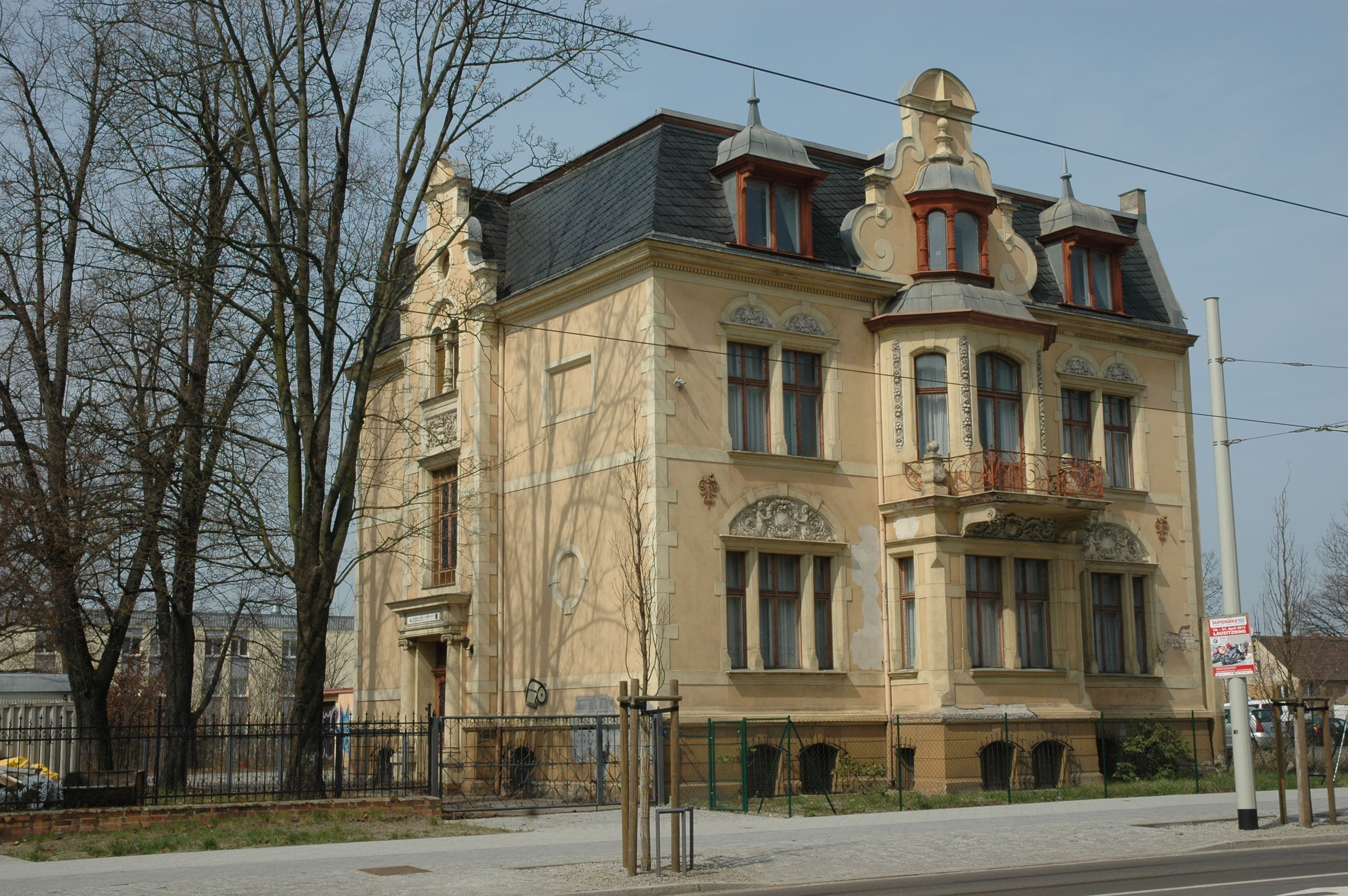 Bahnhofstraße 71